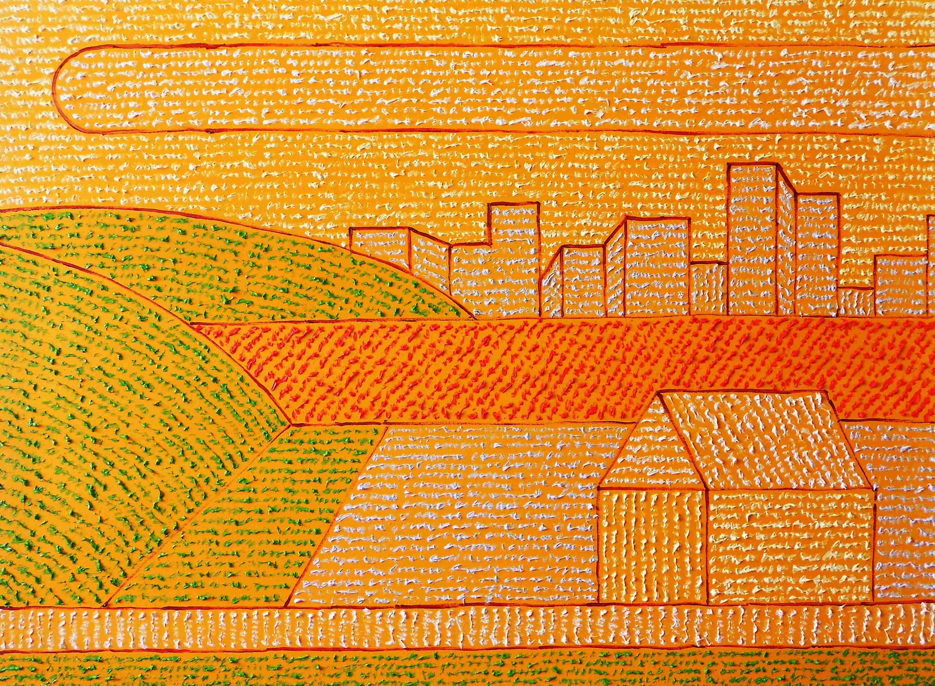 Любомир Тимків, "Майорівка" (2016 р., полотно, олія, розмір 85 х 115 см.)